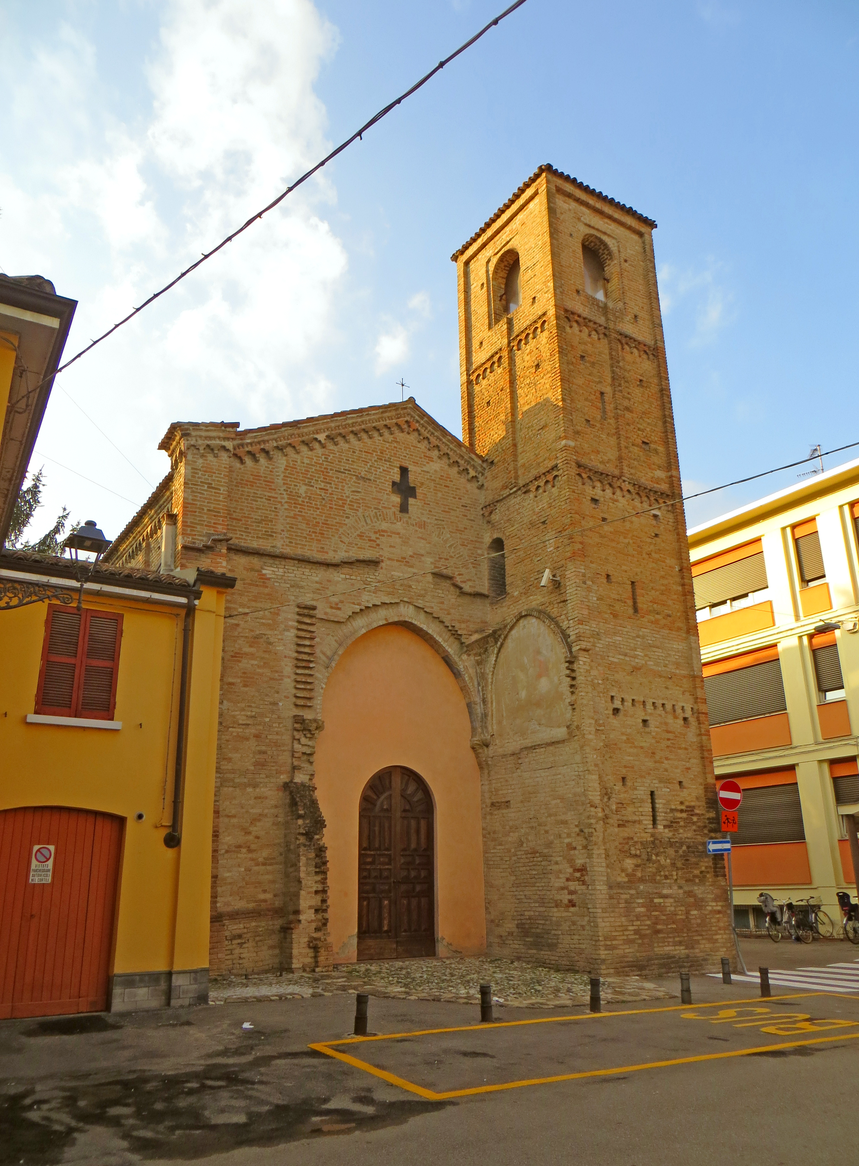 Oratorio di San Giorgio (Fidenza) - facciata